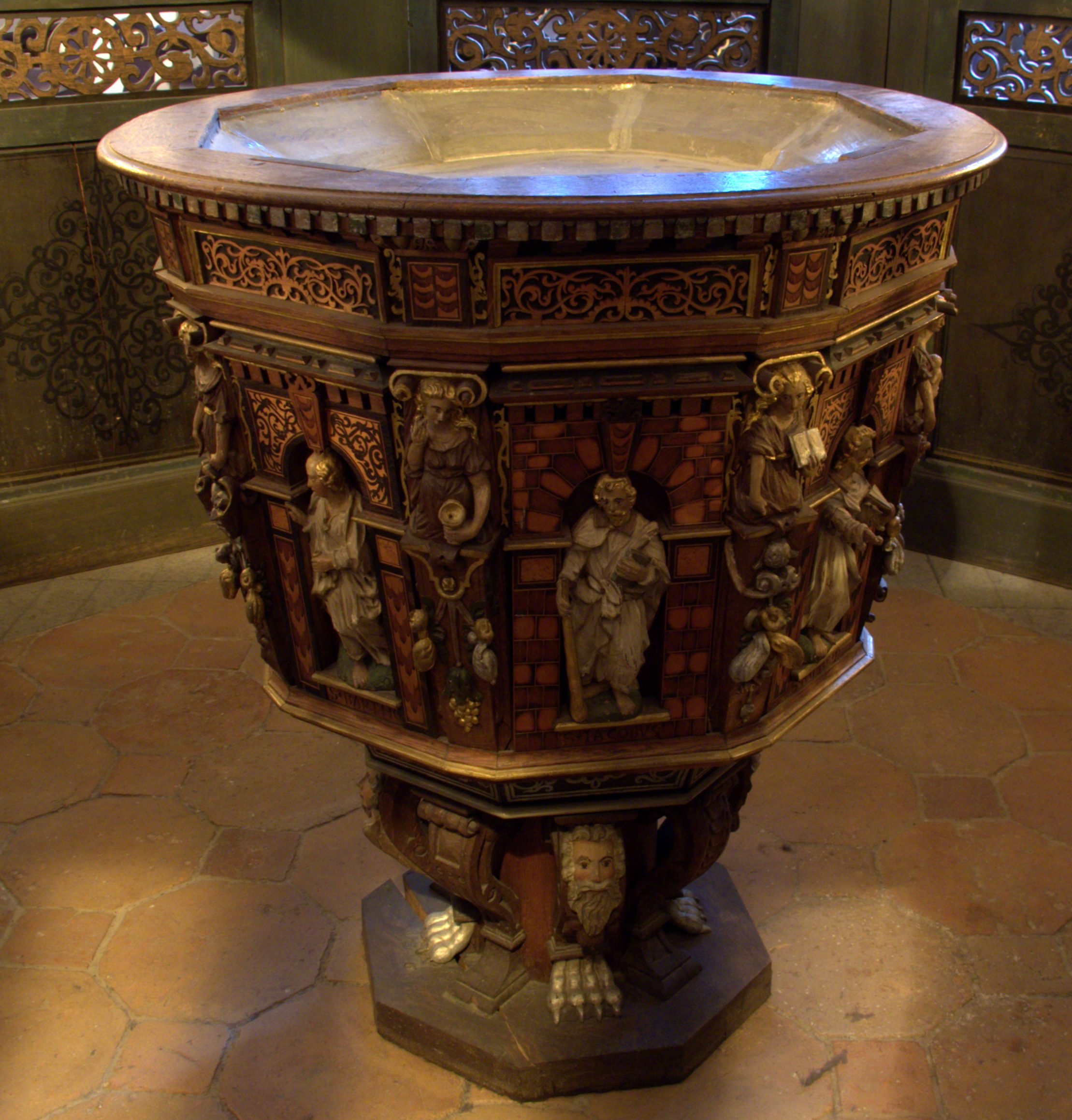 Dopfunt i Depkenska dopkapellet i Västerås domkyrka